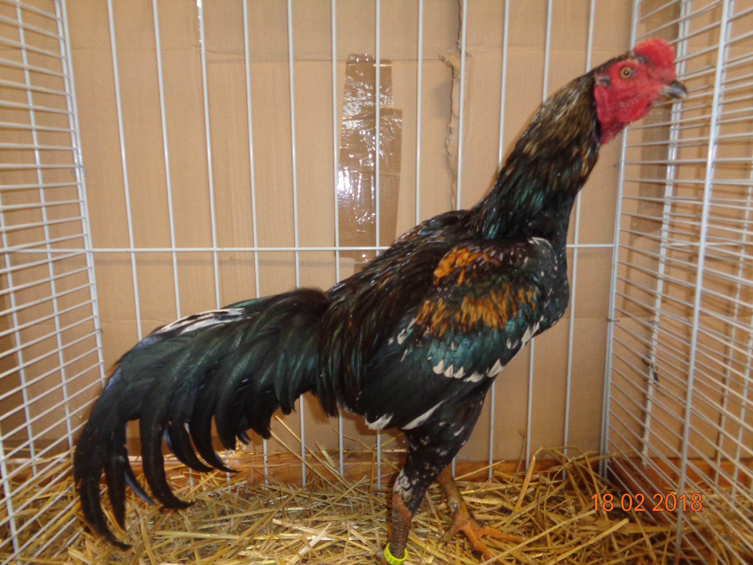 Coq Asyl